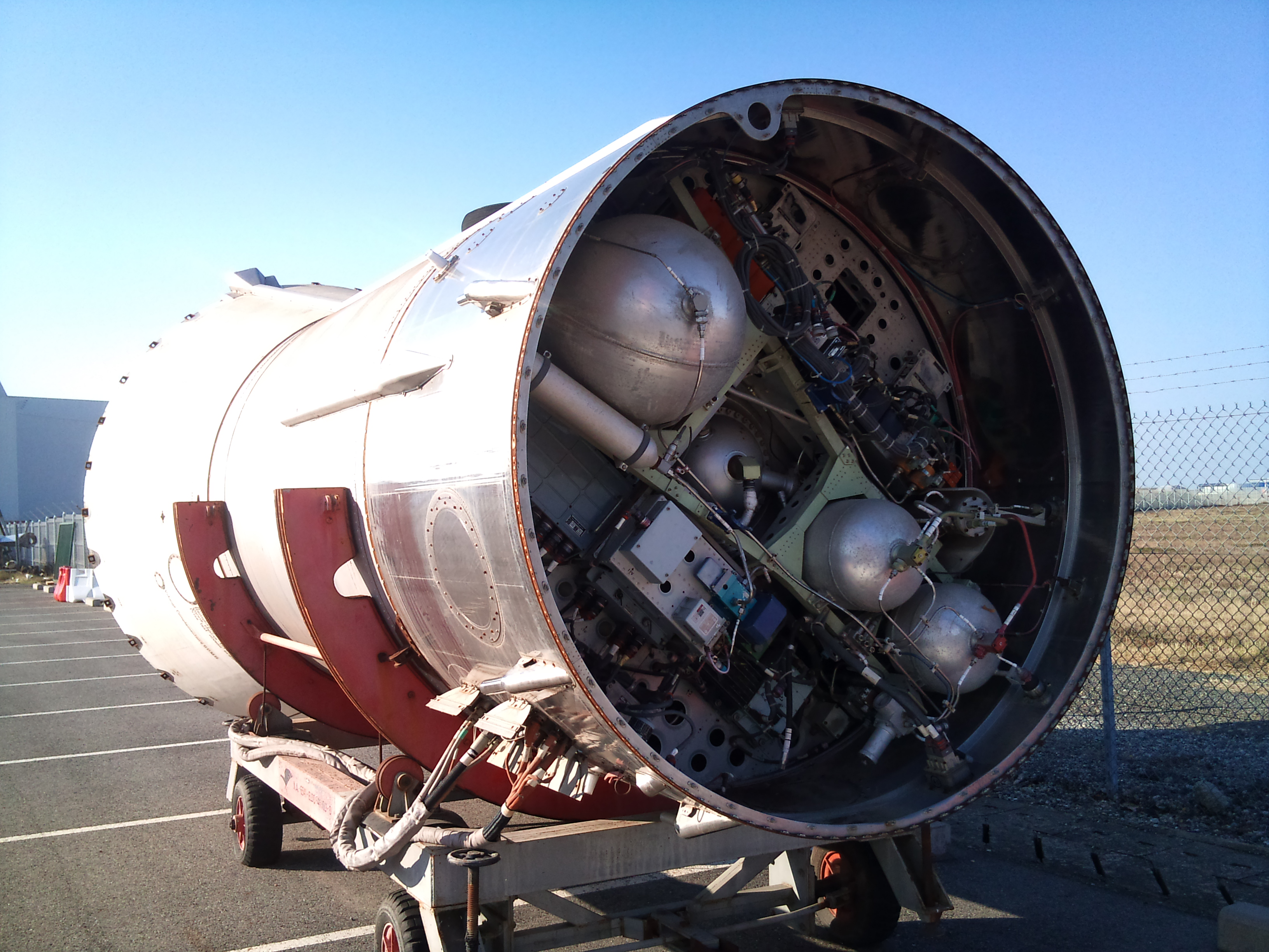 Étage Coralie de la fusée Europa, conservé par les Ailes Anciennes Toulouse.